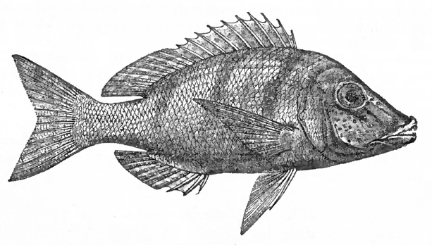 Lethrinus nebulosus (Forsskål, 1775)